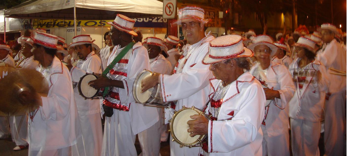 GRES Acadêmicos do Engenho da Rainha